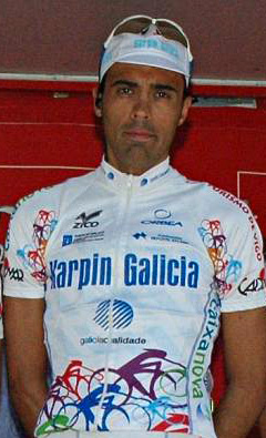 Delio Fernández. Karpin-Galicia, Euskal Bizikleta 2008